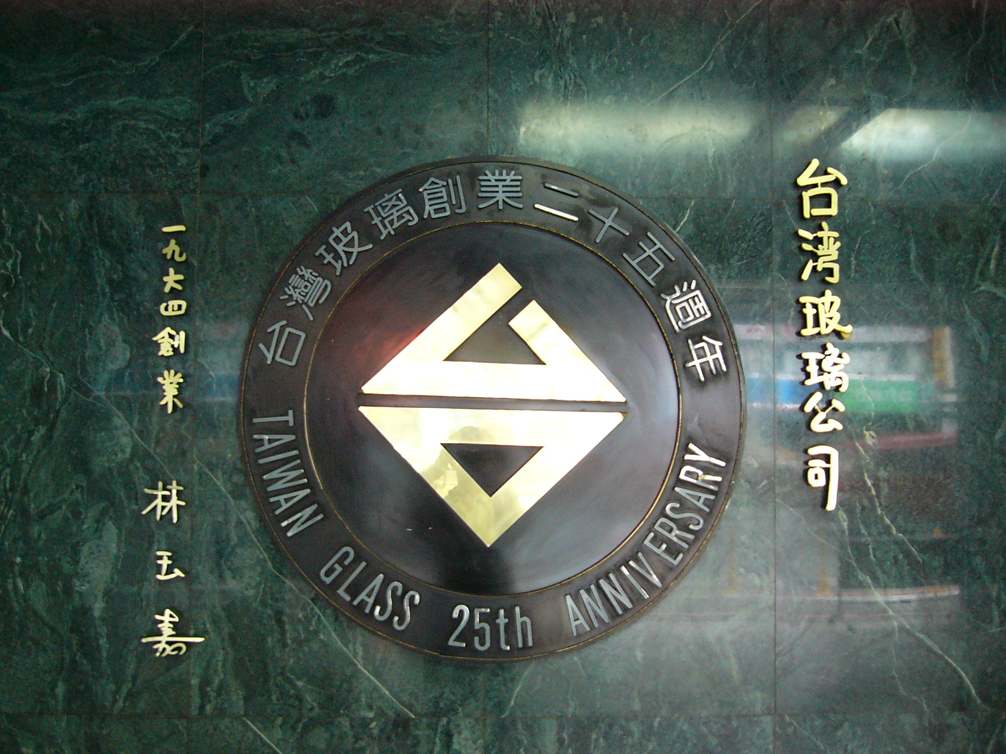 台灣玻璃創業25週年標誌牆，台灣玻璃創辦人林玉嘉題字，位於台玻大樓一樓大廳。